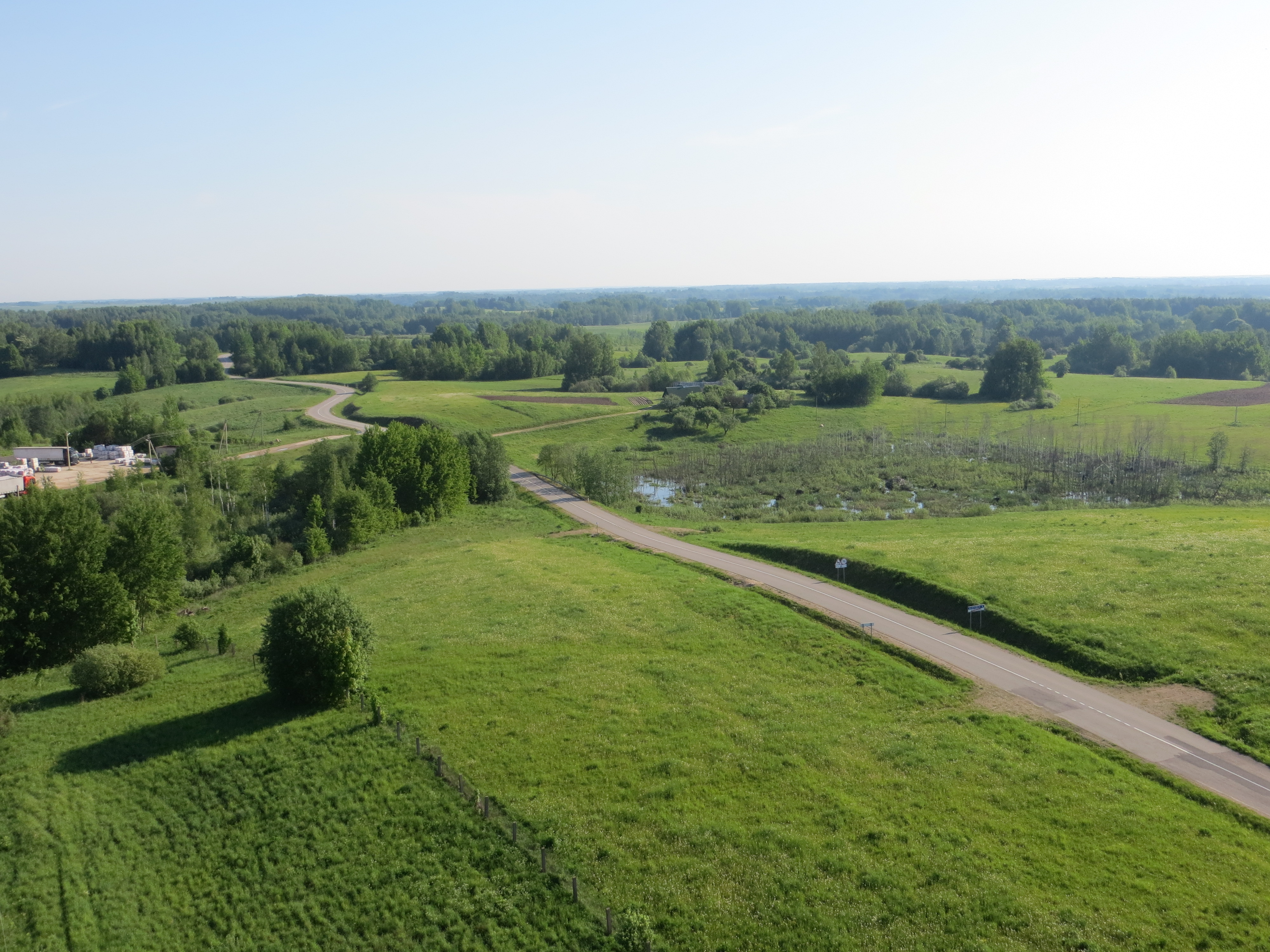 Dubingiai, Lithuania